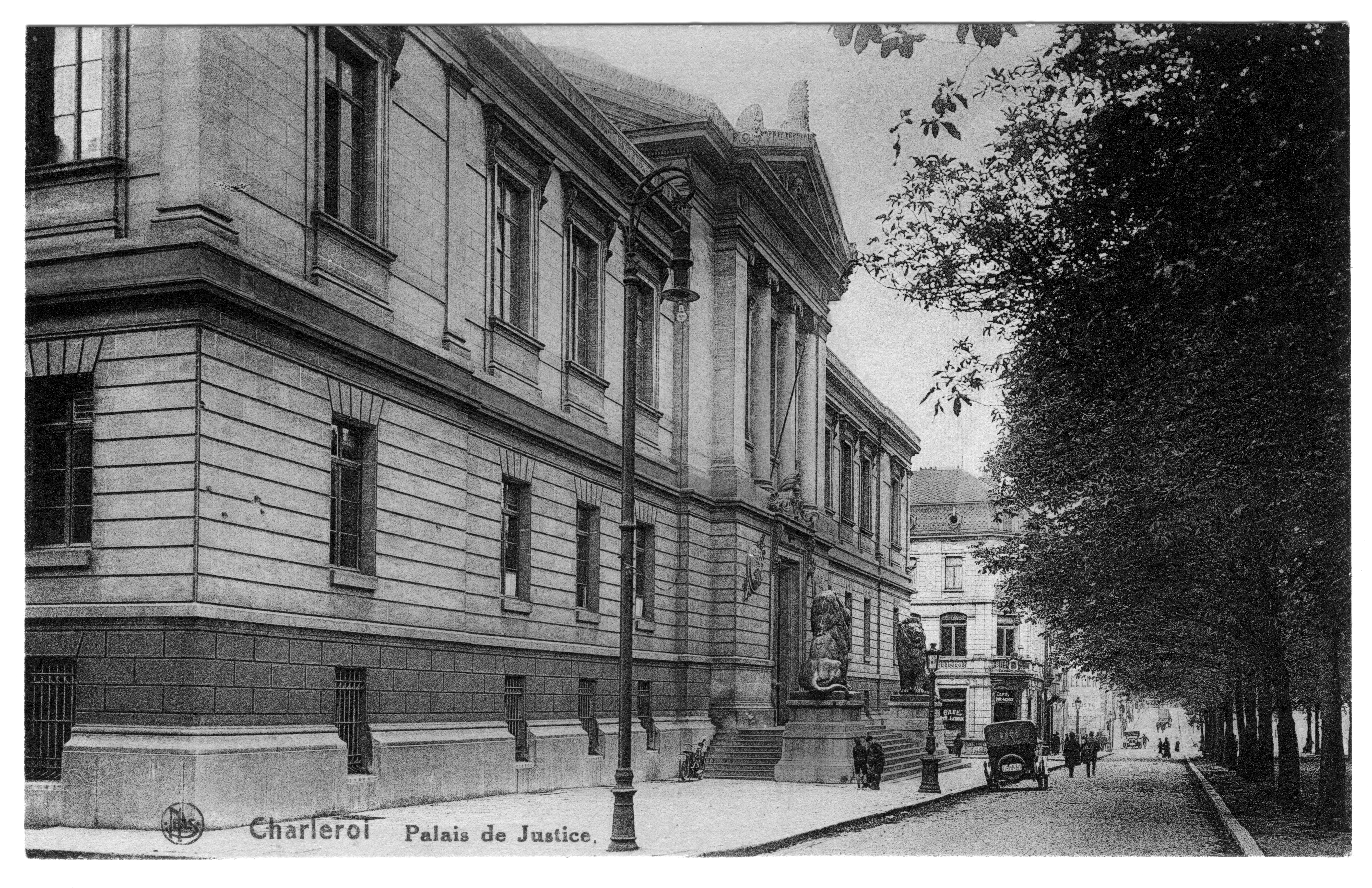 Charleroi - palais de justice au boulevard Audent - Carte postale du début du XXe siècle.